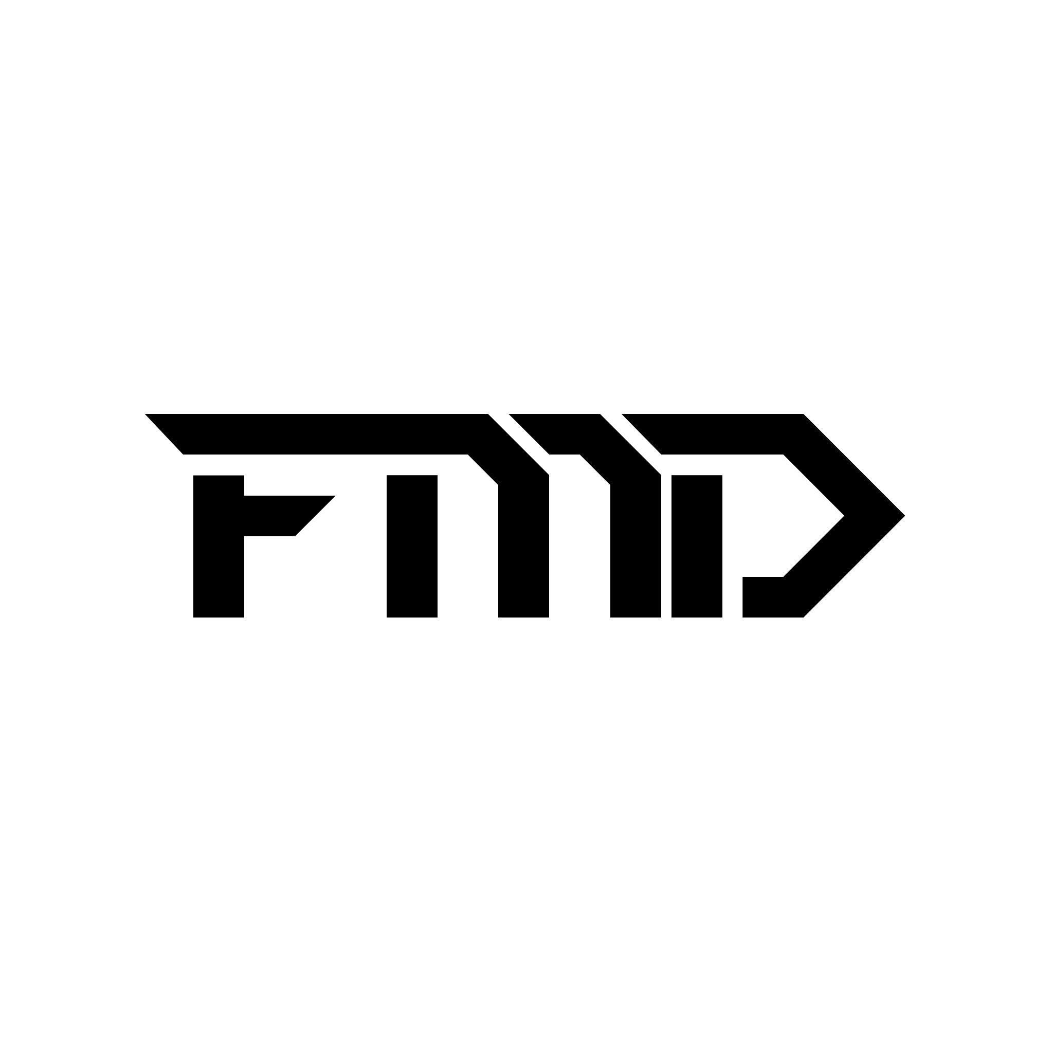 FMDのロゴ。背景は白で塗りつぶし